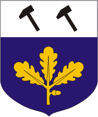 Kilingi-Nõmme suurvapp